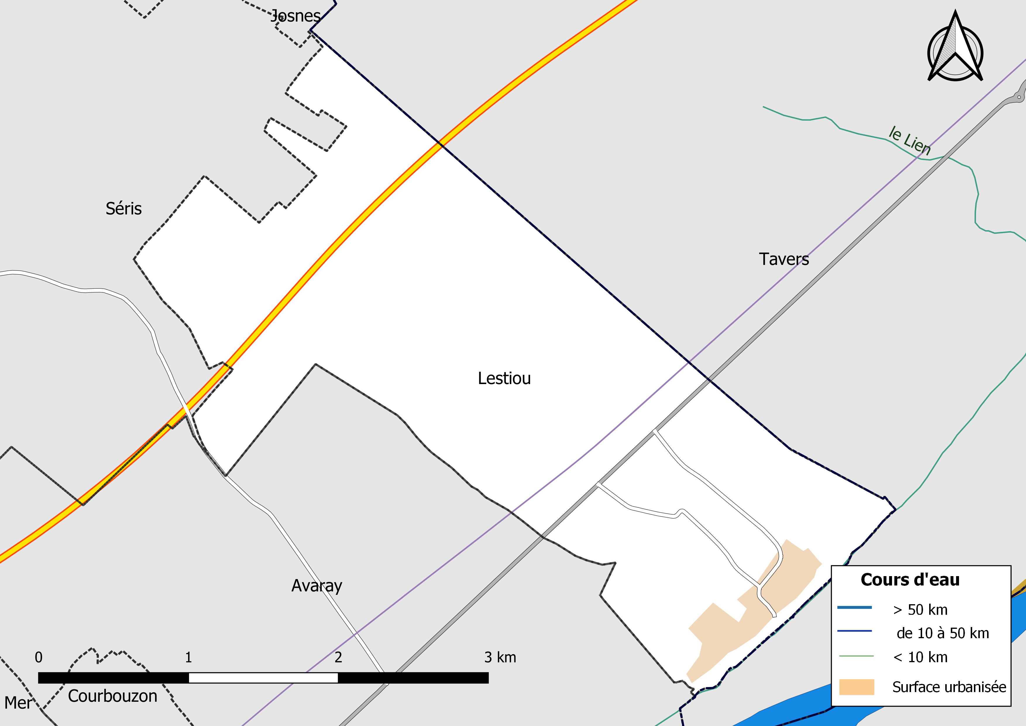 Carte du réseau hydrographique de la commune de Lestiou (France).